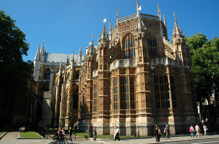 西敏寺背面一景 摘要 西敏寺是倫敦最重要的地標之一，是一座採哥德式建築設計的教堂，圖中所見是西敏寺由正後方拍攝的一景，可以很明顯的看出哥德建築特有的飛扶壁結構。 本圖片由上傳者User:SElephant在2005年9月拍攝。